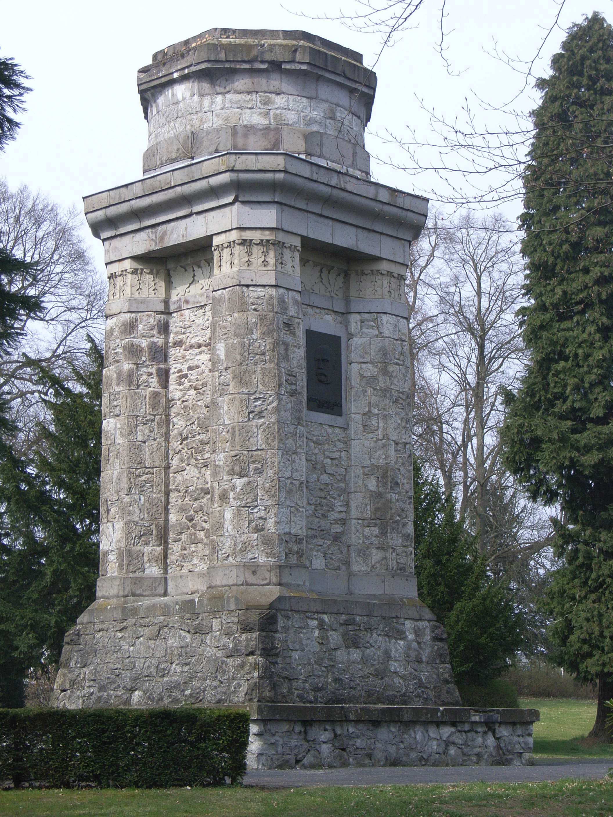 Bismarckturm Rengsdorf, Rheinlnad-Pfalz